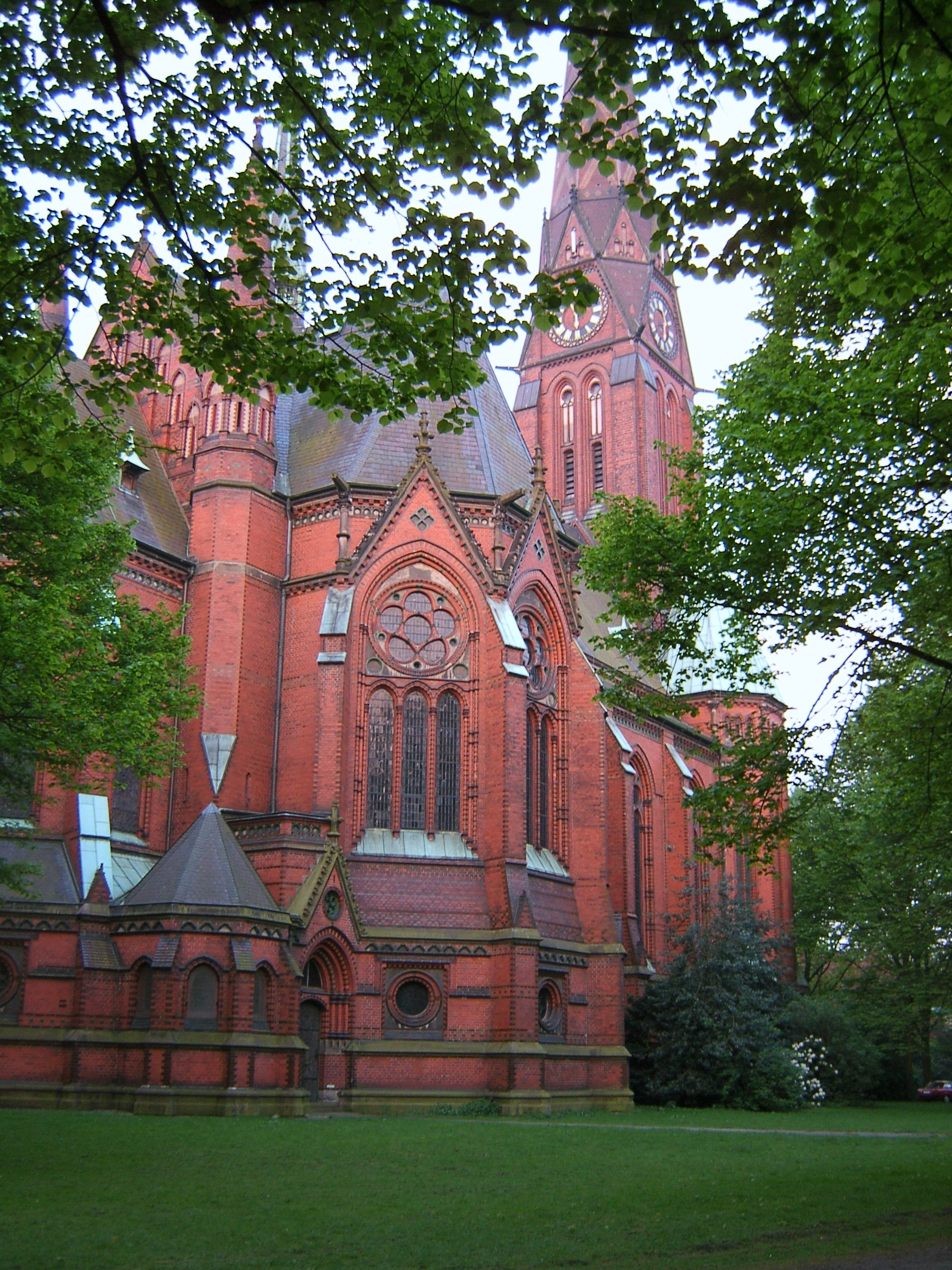 Die St.-Gertrud-Kirche in Hamburg-Uhlenhorst.